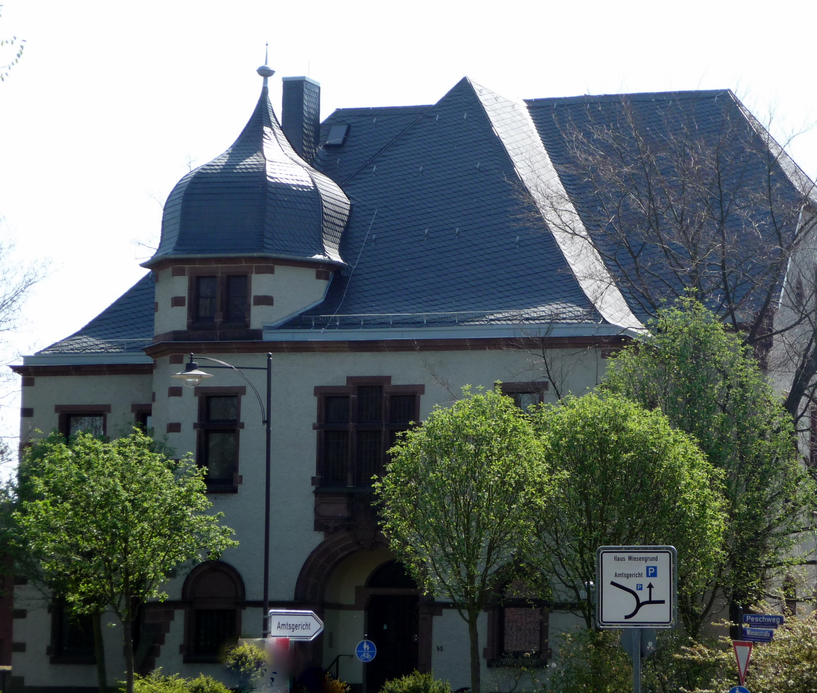 Kempen 2010-04-18 – Amtsgericht Kempen